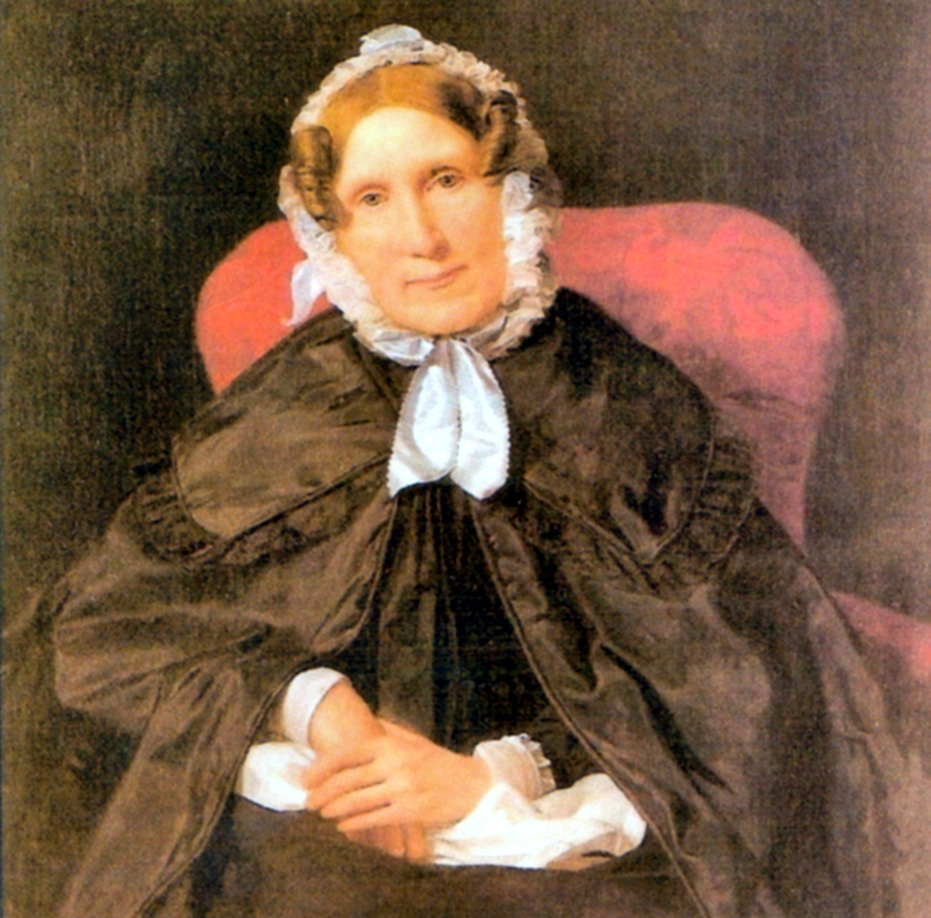 Freiin Elisabeth (Elise) von Ysselbach (1779-1853), Gattin des Franz Ludwig Graf Bigot de St. Quentin 1774-1854, FML